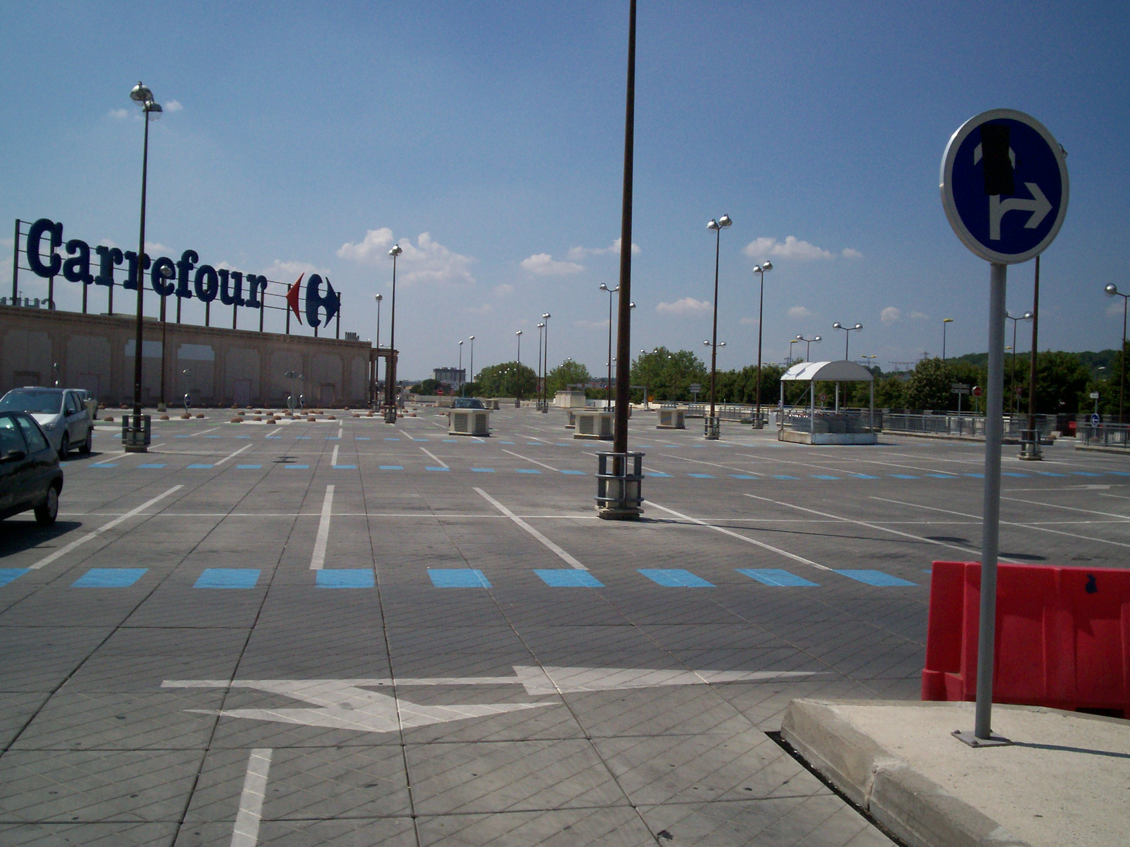 Parking du niveau 1 de Chelles2